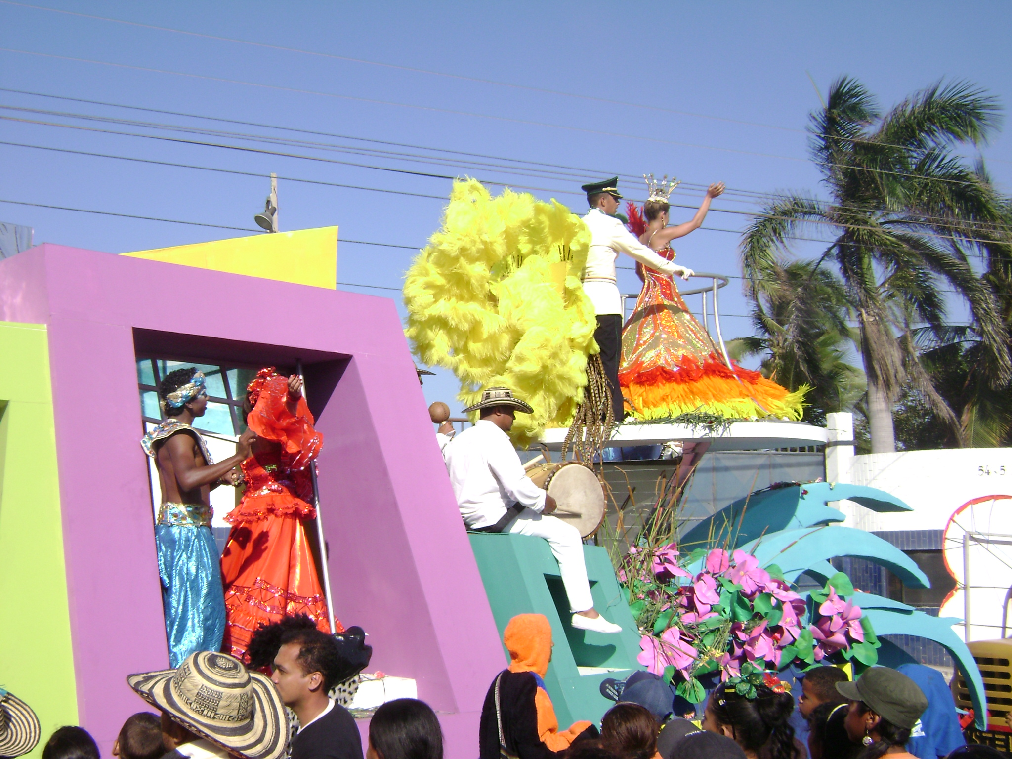 Carrosa del Carnaval de Barranquilla, Reina del Carnaval